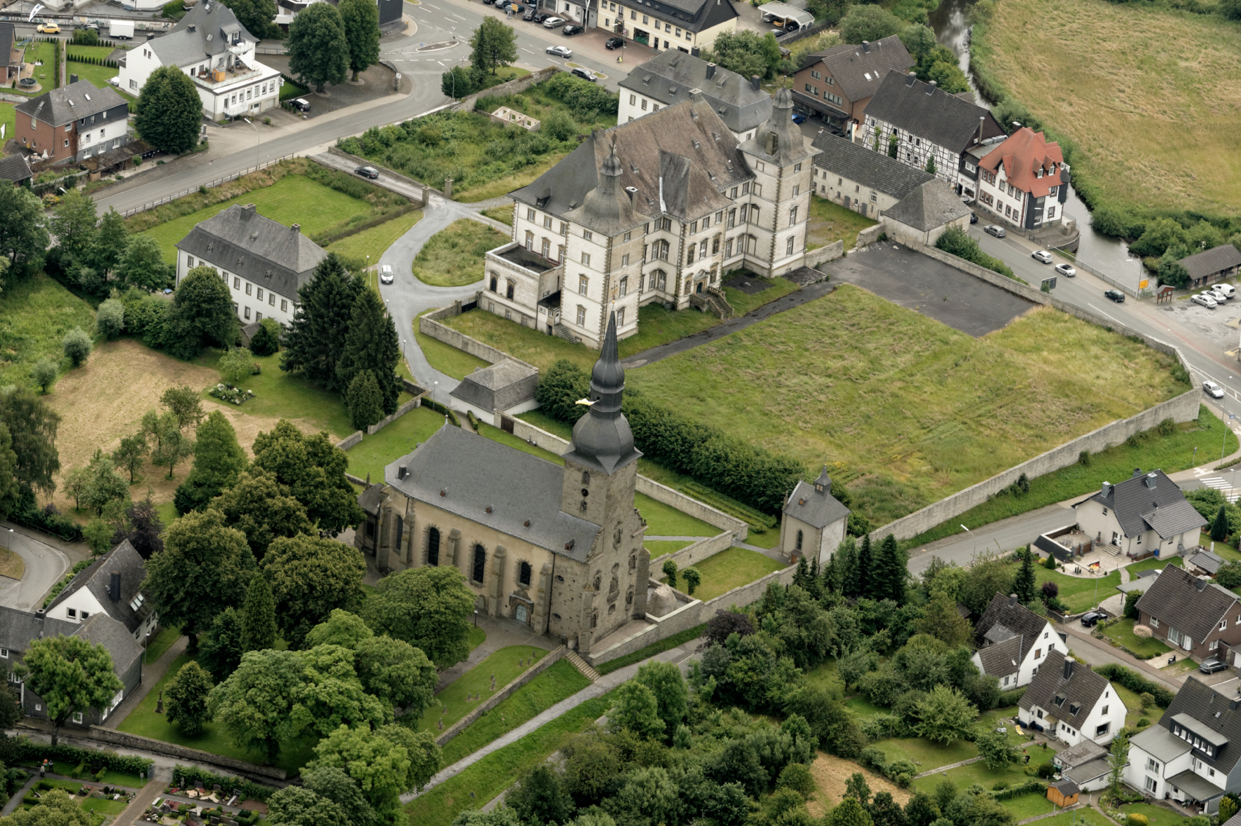 Ehemalige Deutschordenskommende Mülheim an der Möhne mit Komtureigebäude, Rentei, Pfarrei, der Kirche St. Margaretha, der Kapelle auf dem Schwesternfriedhof in Warstein-Sichtigvor (Fotoflug Sauerland Nord) The making of this document was supported by the Community-Budget of Wikimedia Germany.